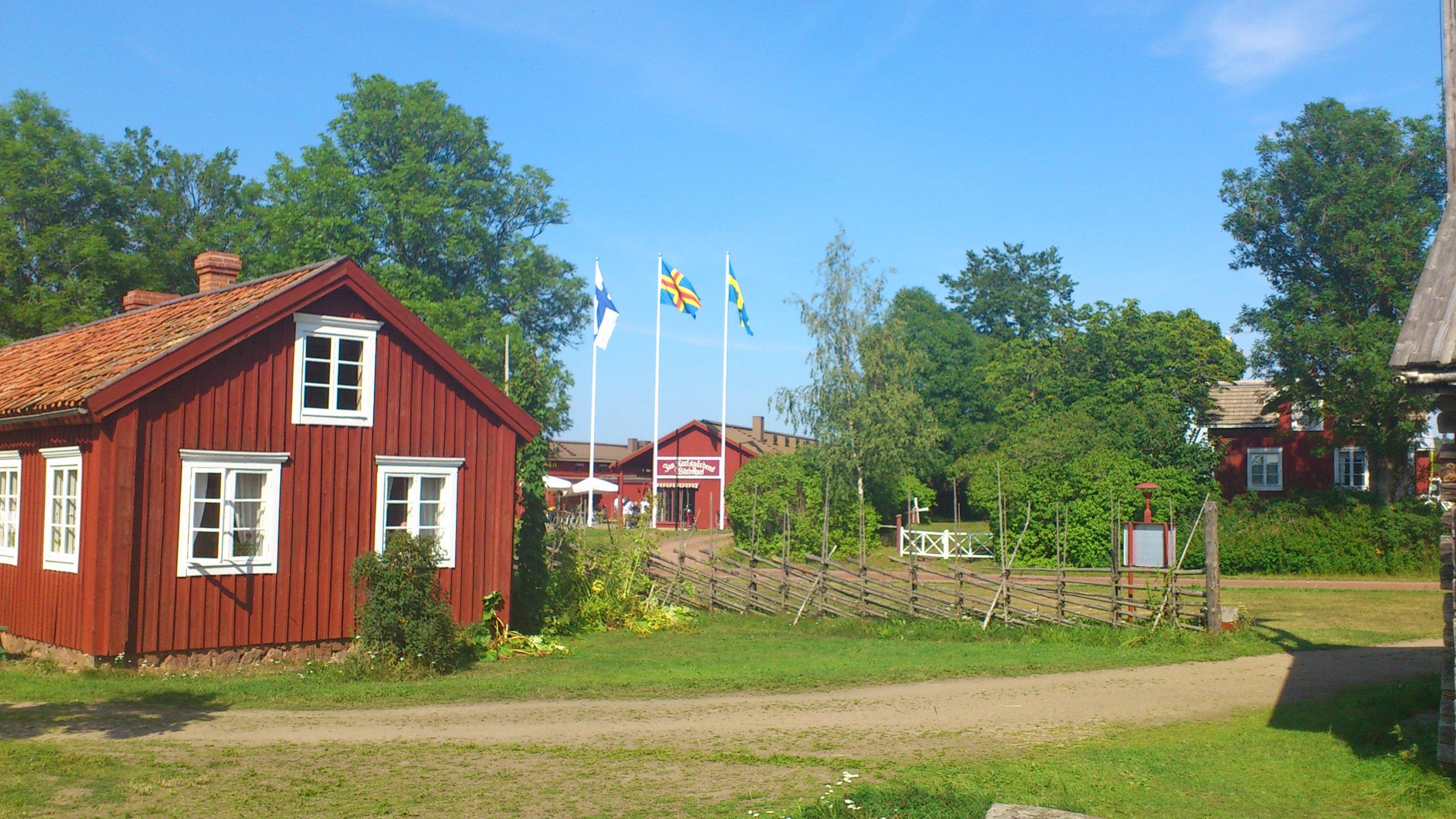 Jan Karlsgården